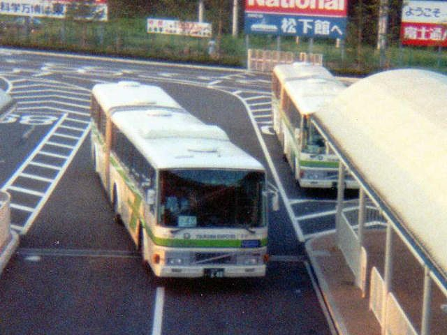 Tsukuba EXPO'85 Super Shuttle Bus Volvo K-B10M at Bampaku-Chuo Sta.